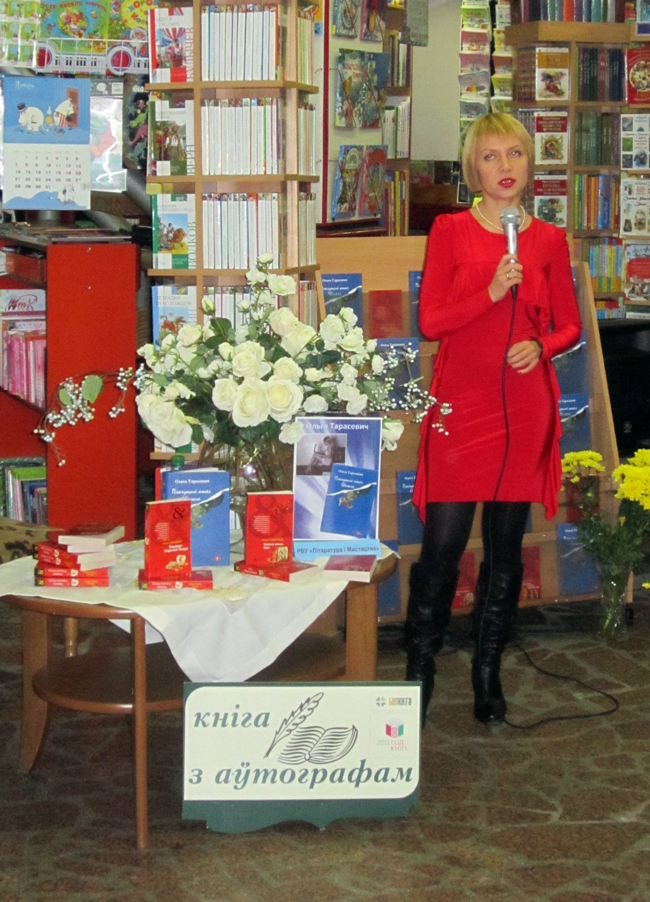 Автограф-сессия Ольги Тарасевич в книжном магазине "Центральный", Минск (30 ноября 2012 год).